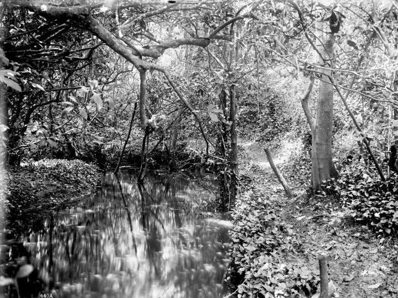 Der Kulimusibach in Ostusambara